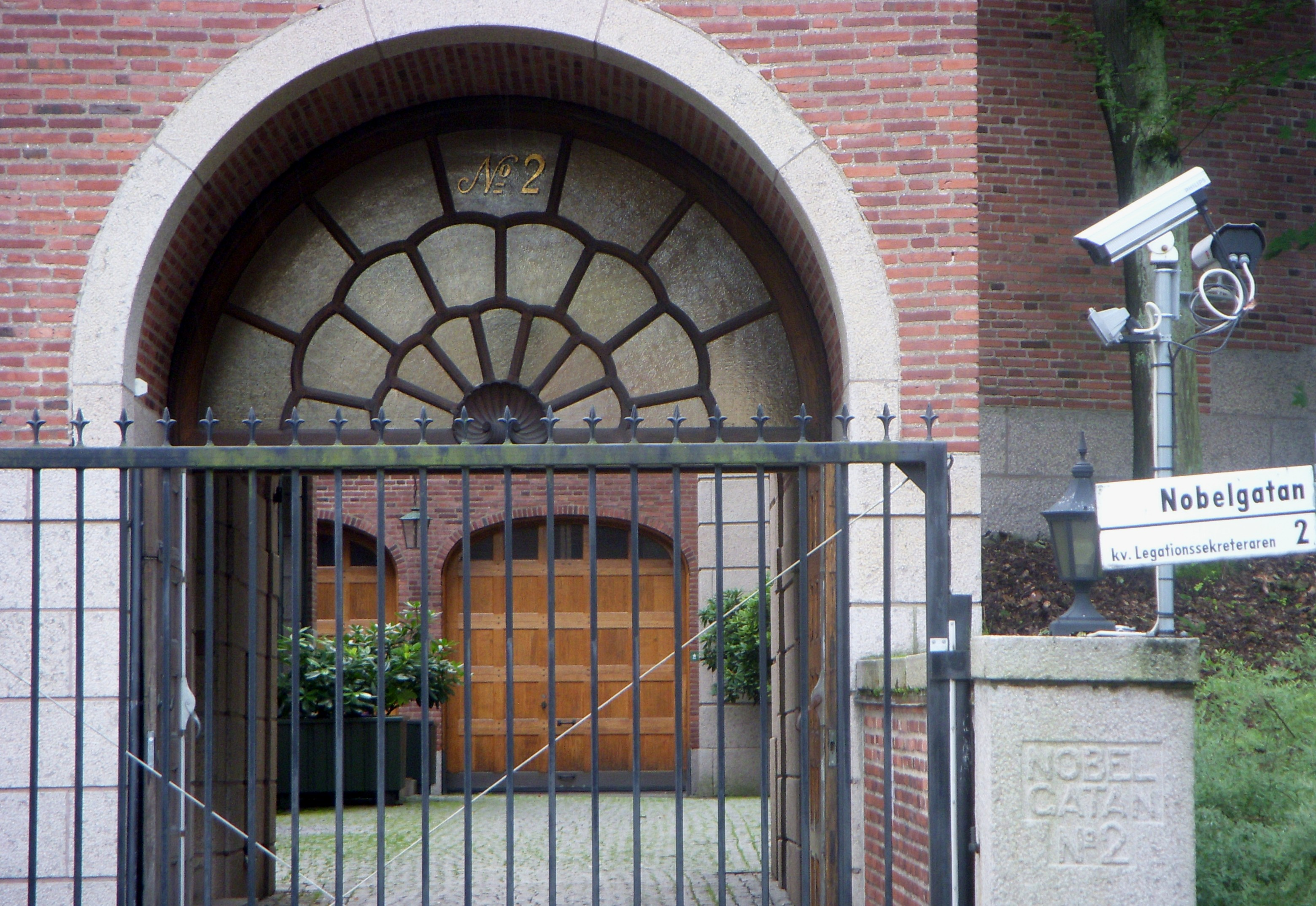 "Villa Åkerlund" i Diplomatstaden i Stockholm, portik mot Nobelgatan